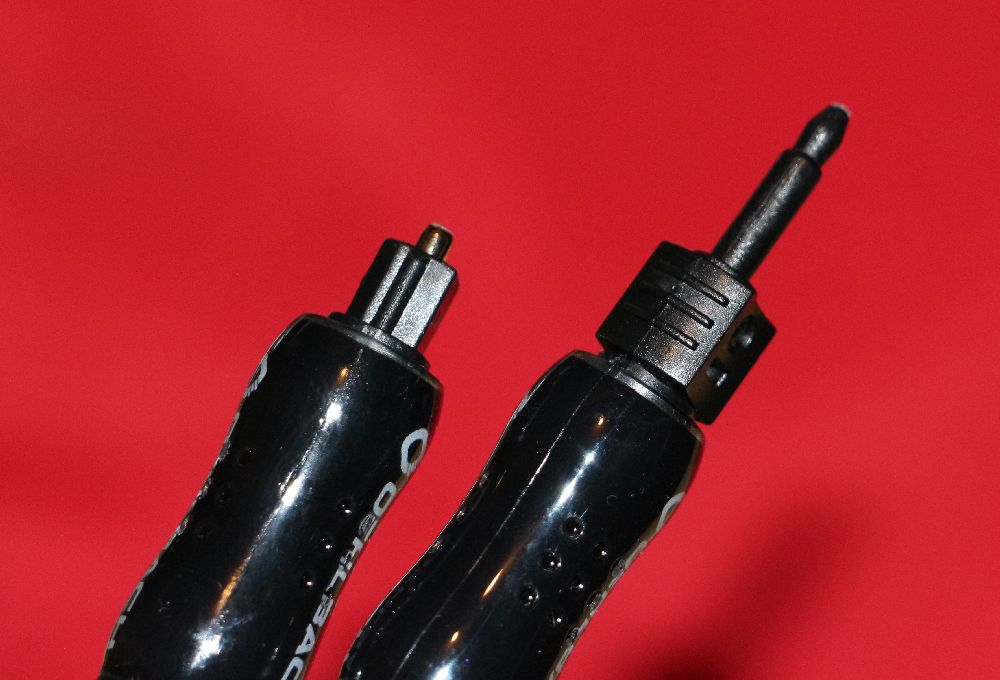 optischer TOSLINK Anschluss, Kabel und Spezialadaptar auf 3.5 Klinke